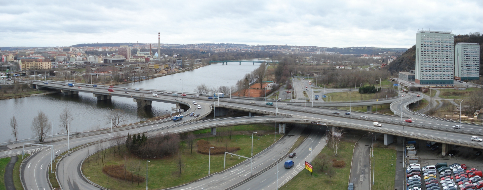 Most barikádníků (Prague, Czechia)